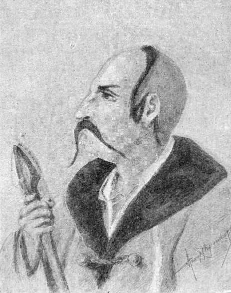 Ilustracja Encyklopedii staropolskiej T.2 237 - Iwan Gonta, ulubieniec Salezego Potockiego, wojewoda kijowski